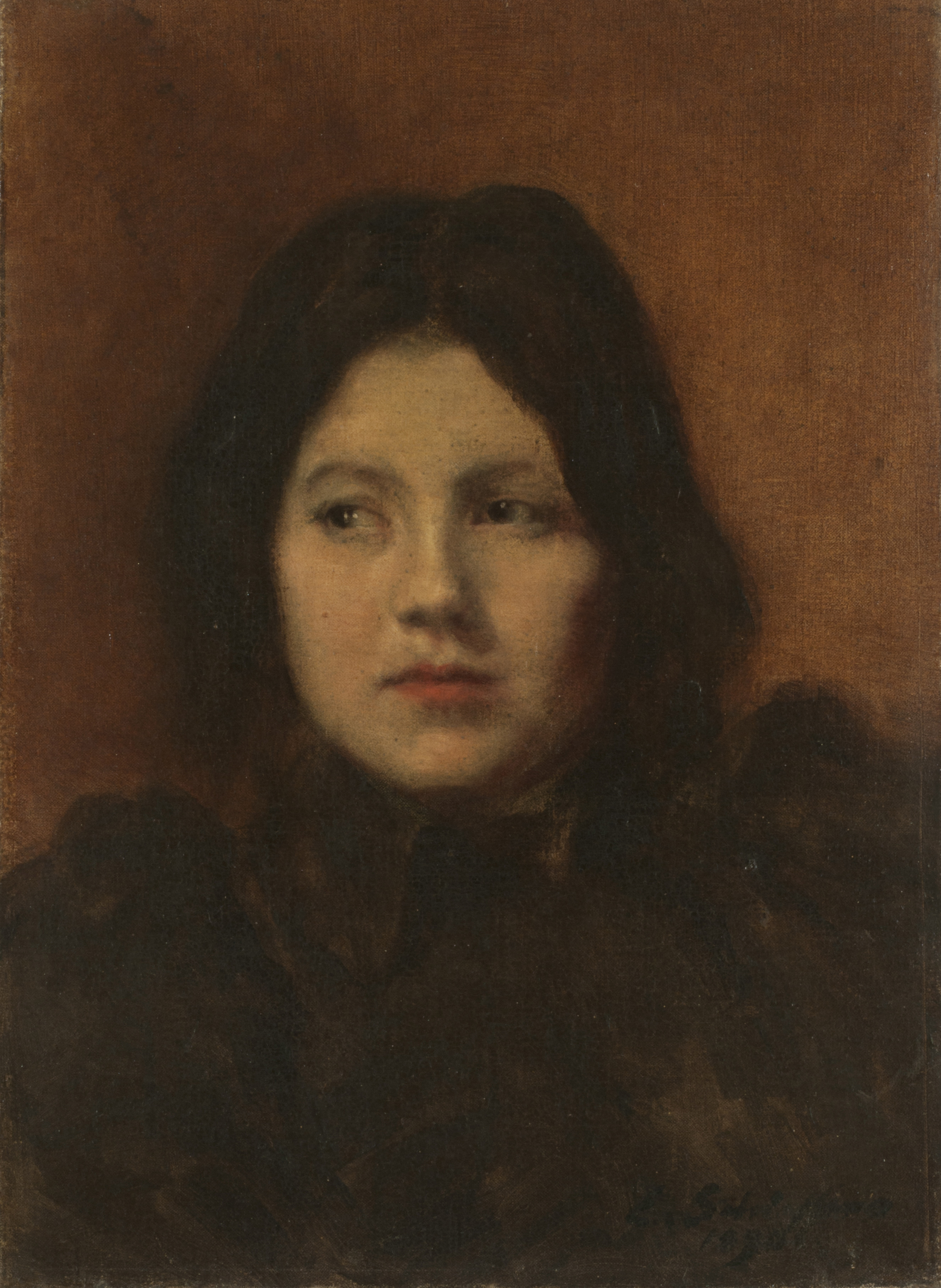 Eduardo Schiaffino, Margot. Siglo XIX. 46 x 33,5 cm, marco: 82 x 70 cm, óleo sobre tela. Inv. 1656.